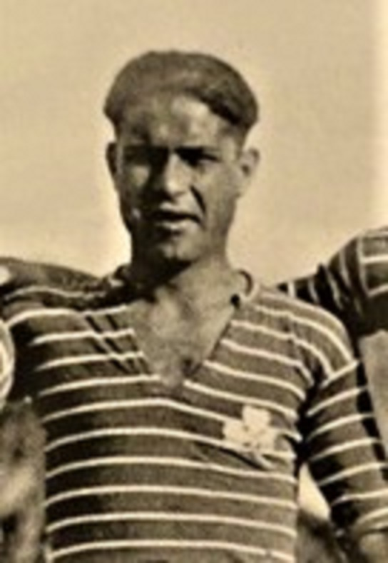 Ο Μιχάλης Βασιλείου με τη φανέλα του Παναθηναϊκού το 1930